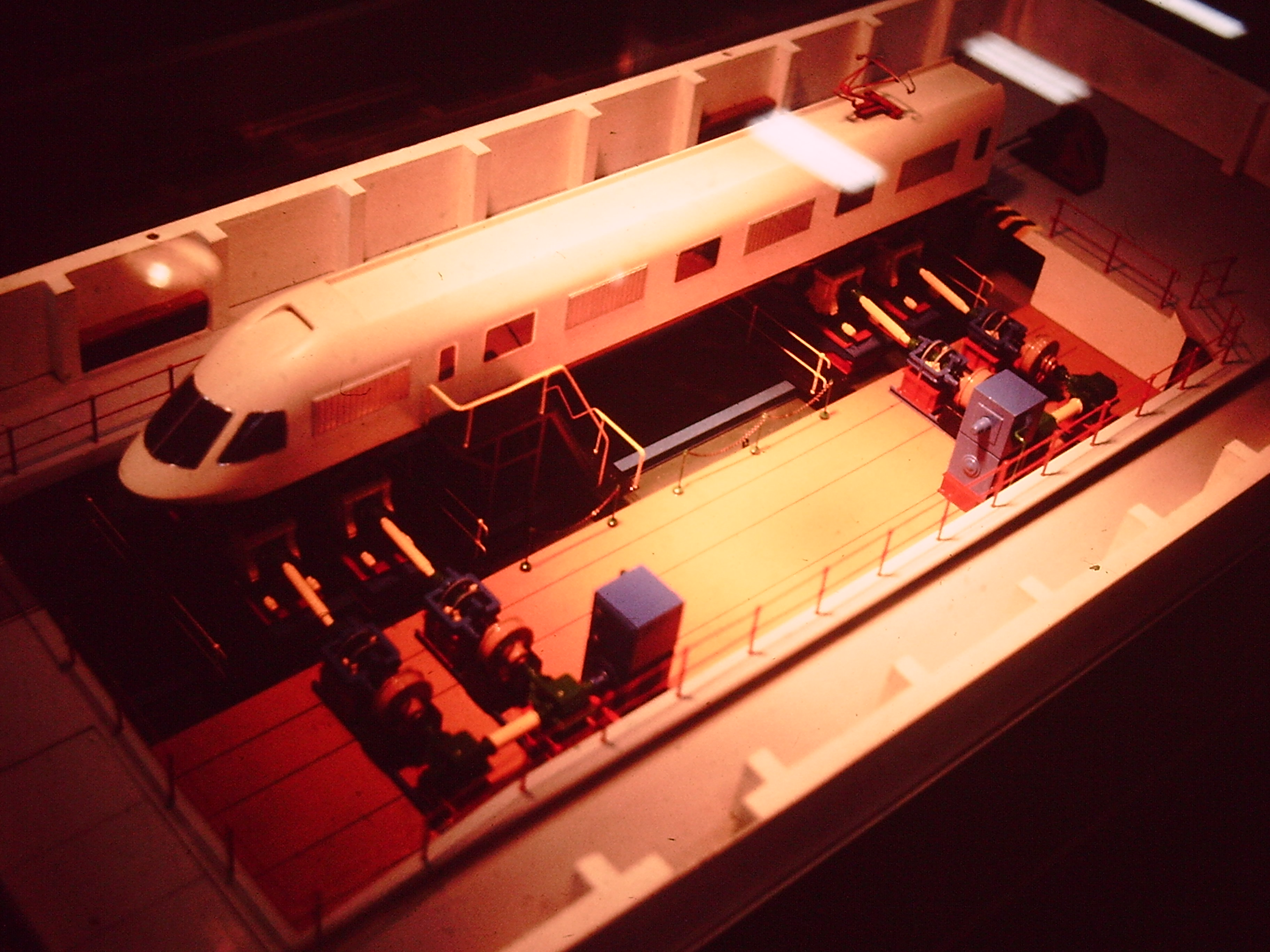 Modell des Rollprüfstands München-Freimann am Messestand der Firma Krauss-Maffei auf der Transport 1982 in München